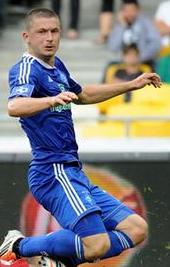 Андрій Цуріков - український футболіст під час виступів за Динамо (Київ)